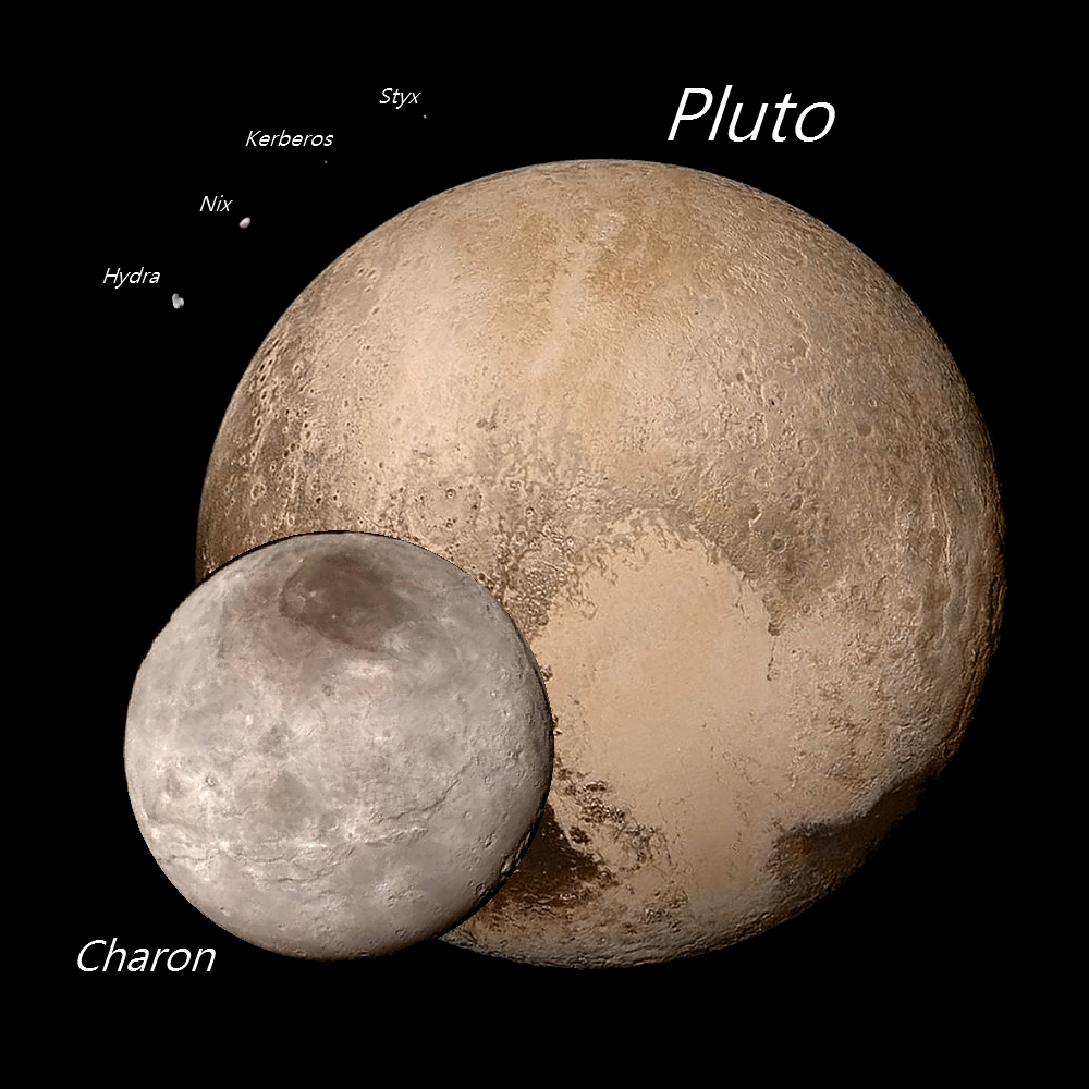 명왕성, 카론, 히드라, 닉스는 뉴호라이즌스호가 촬영한 이미지 입니다. 명왕성과 카론의 크기비율은 비슷하게 만들었으나 나머지 4개의 위성은 일치하지 않습니다.